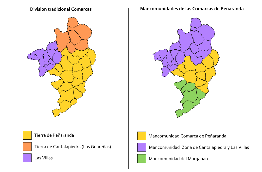 Mapa de las Comarcas históricas y Mancomunidades de Municipios circunscritas en el Partido Judicial de Peñaranda de Bracamonte